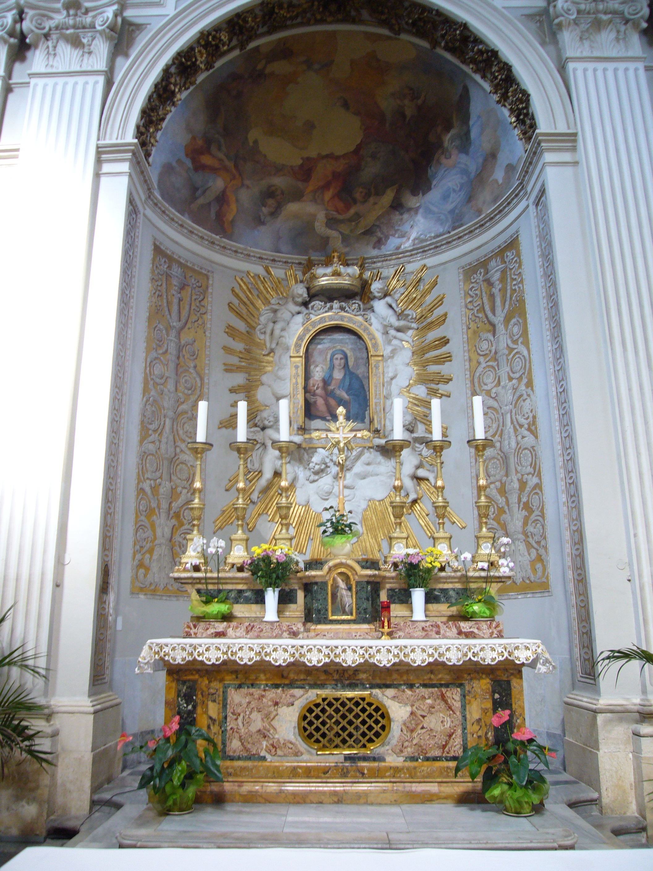 Roma, santa Maria della Luce, altar maggiore e Madonna della Luce (anonimo XVI sec.)